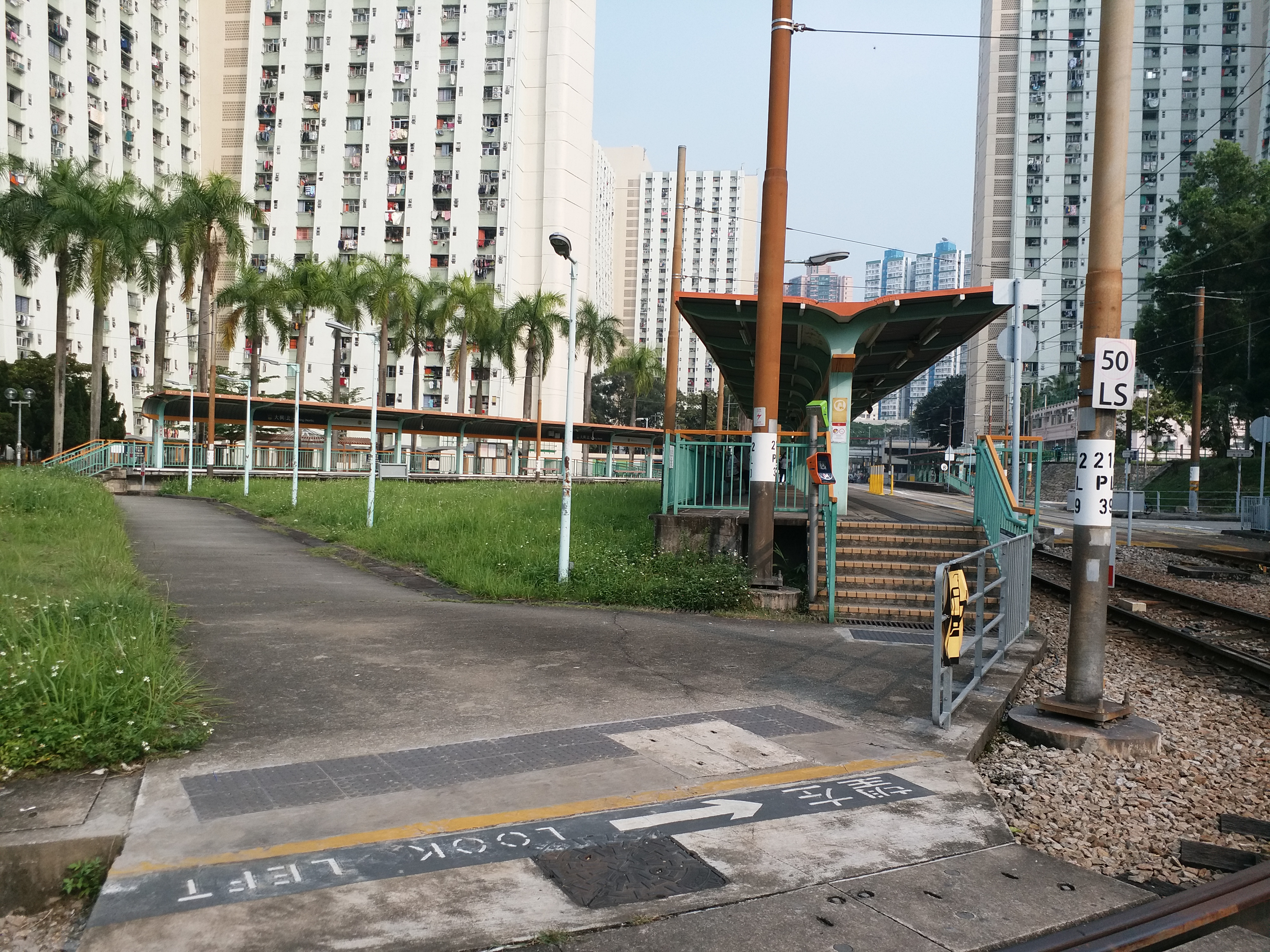 大興（北）站全景